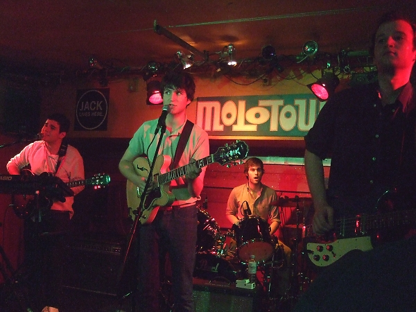 Vampire Weekend im Molotow, Hamburg